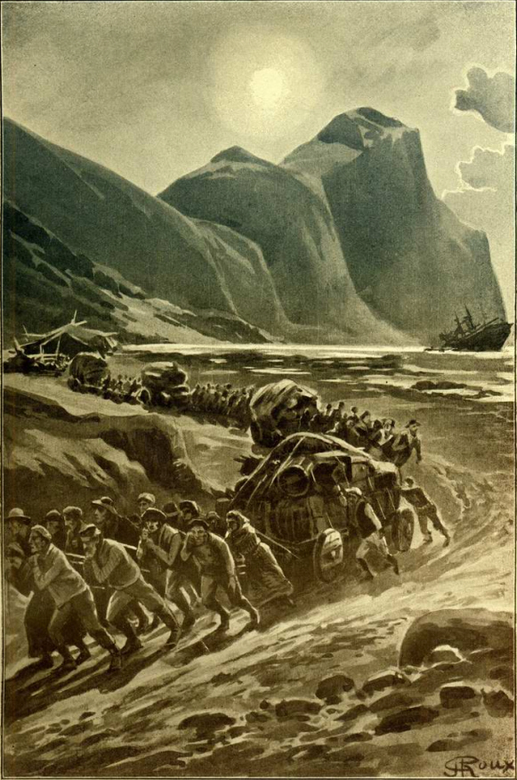 Ilustrace G. Rouxe ke knize J. Verna